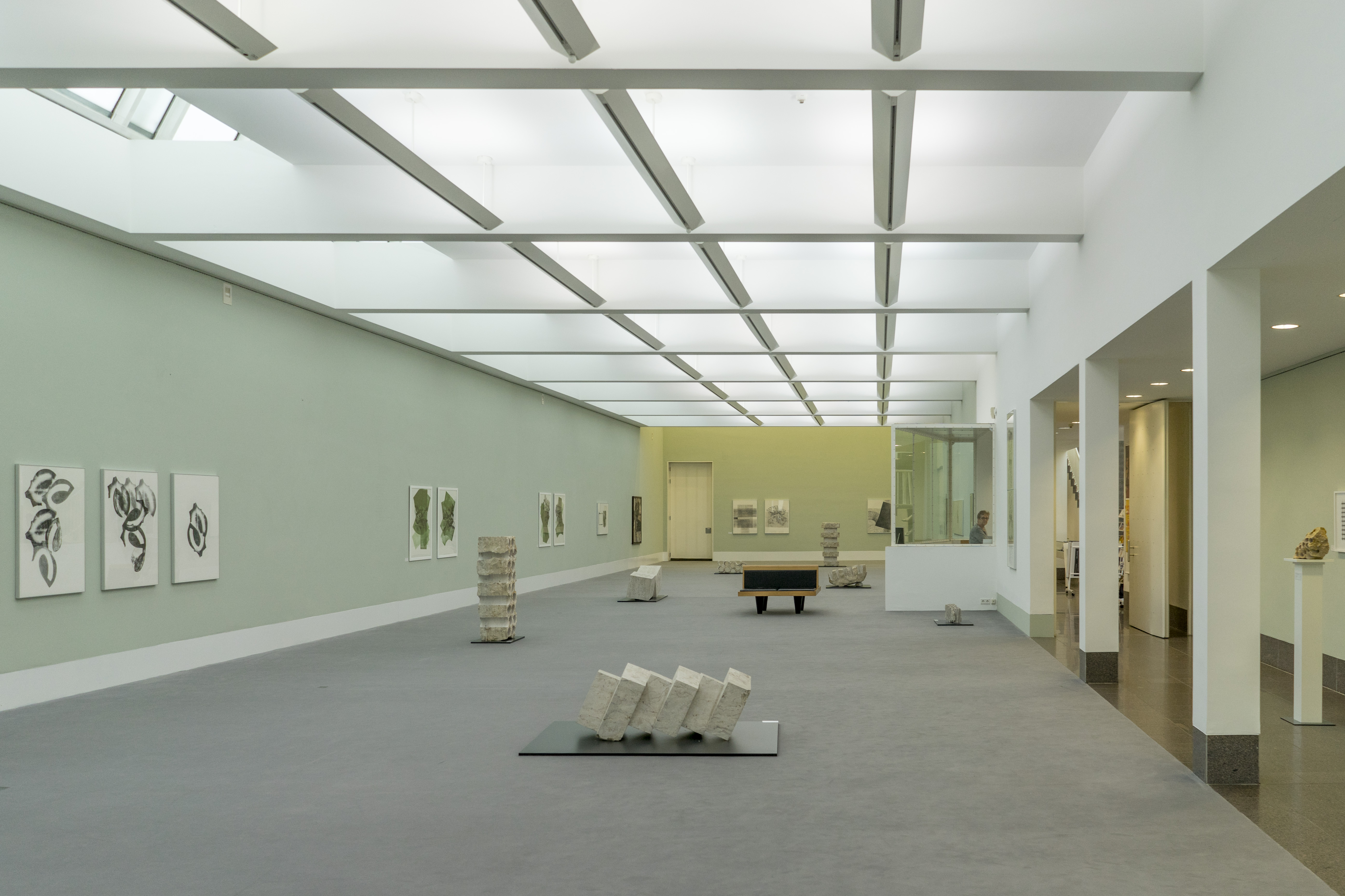 Kleihuesbau Haupthalle, Stuttgart Kornwestheim Skulpturen Hans Madlinger, Drucke Angelika Flaig